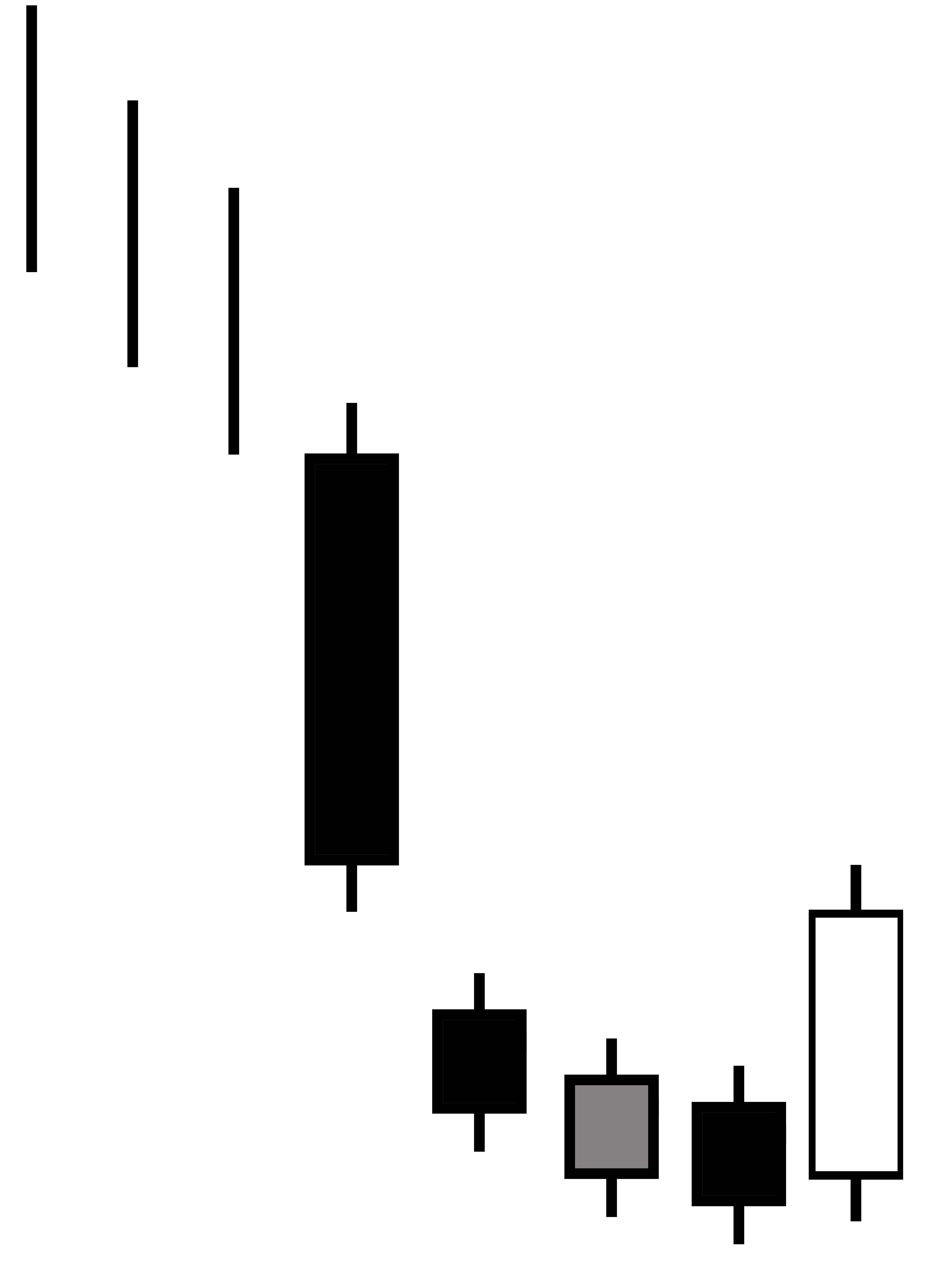 Bullish breakaway